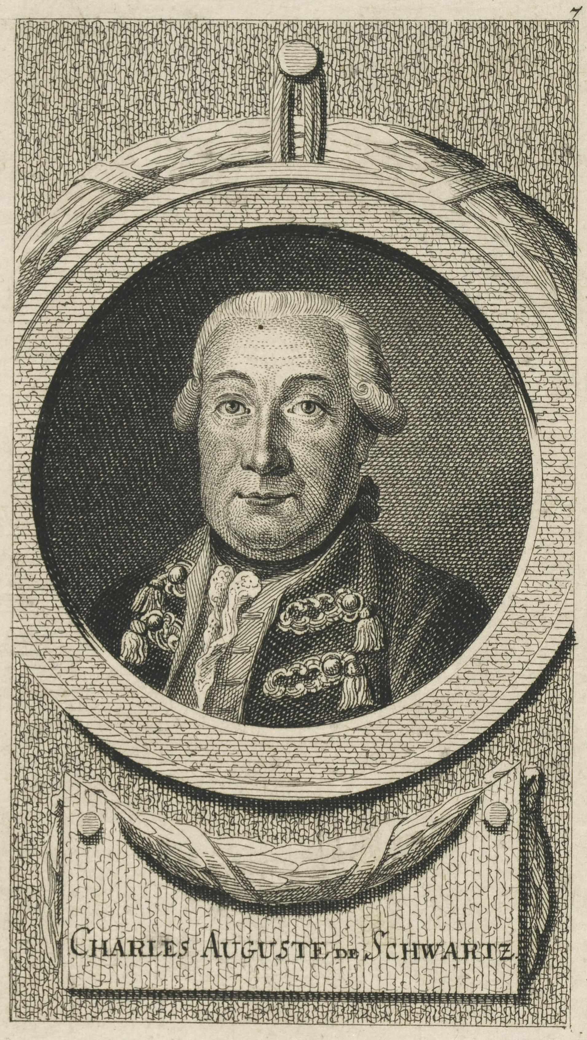 Karl August von Schwartz (1715-1791), preußischer Generalleutnant, Gouverneur von Neisse; Radierung; Leipzig, Universitätsbibliothek Leipzig, Porträtstichsammlung, Inventar-Nr. 47/16